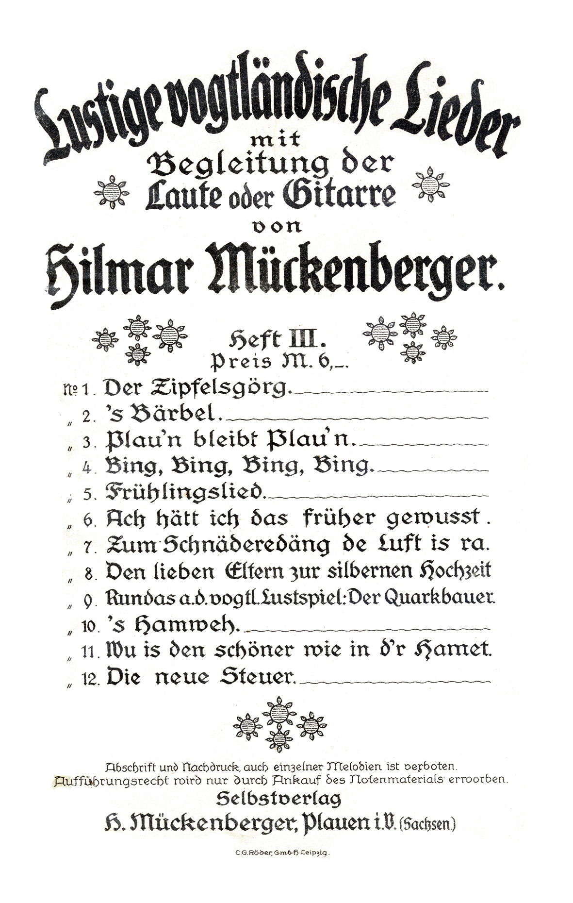 eindimmensionales Titelbld eines Notenheftes von Hilmar Mückenberger, ca. 1910